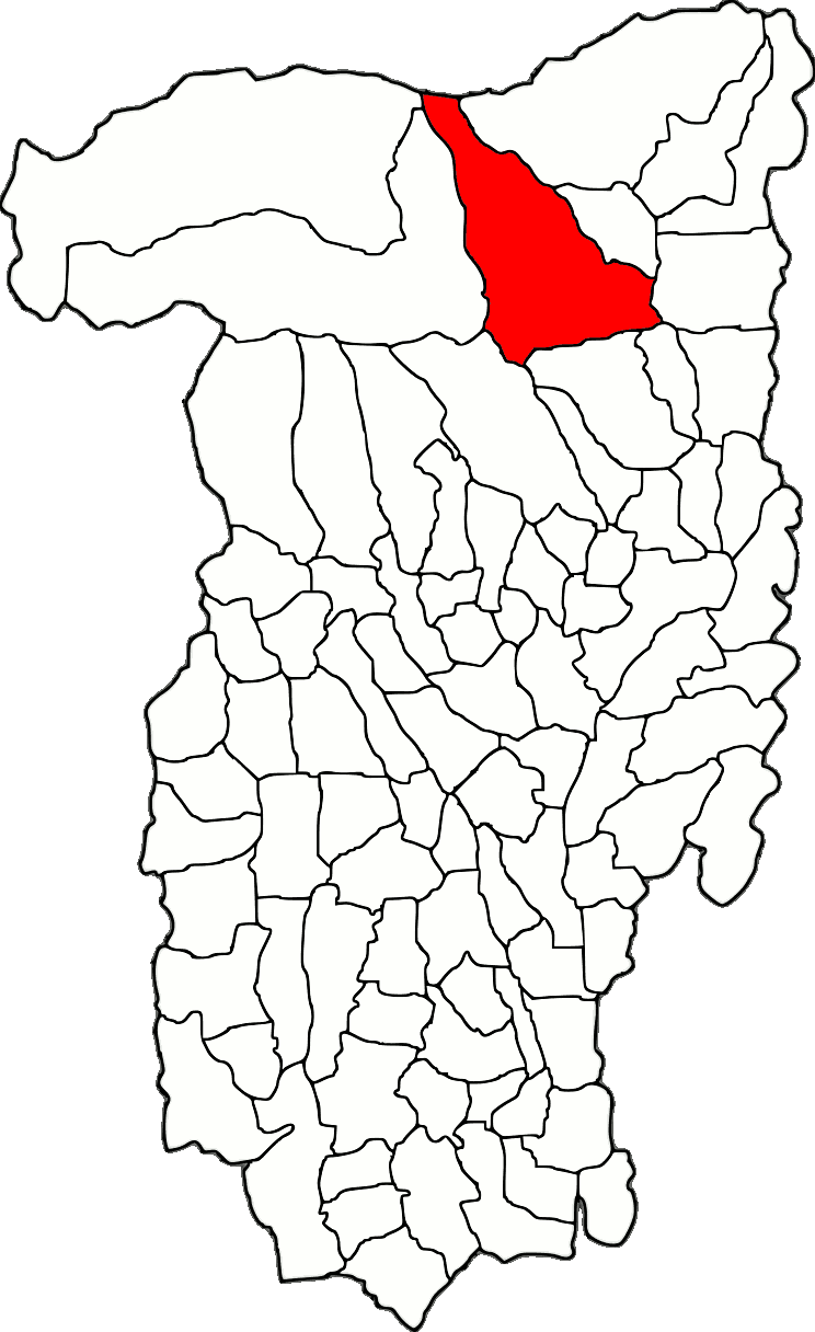 Lage der Stadt Brezoi im Kreis Vâlcea (RO).